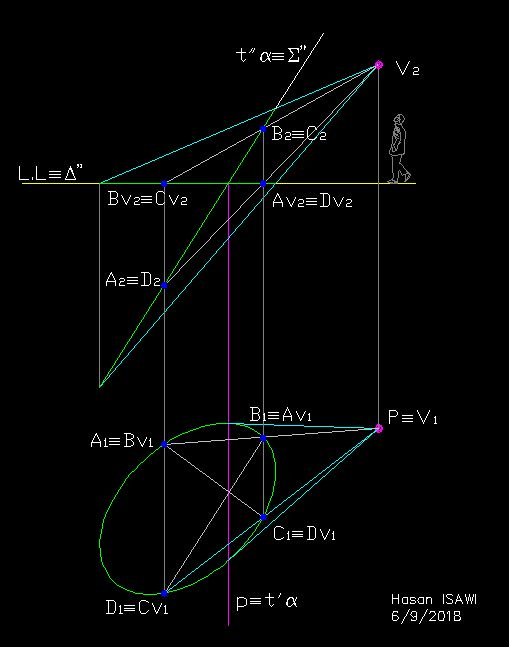 لقد توصلت، من خلال الهندسة الوصفية ، الى فهم أن القطبية ليست الا نوع من العلاقة الالتفافية (Involution) مصدر: الدكتور حسن العيسوي (LINK)